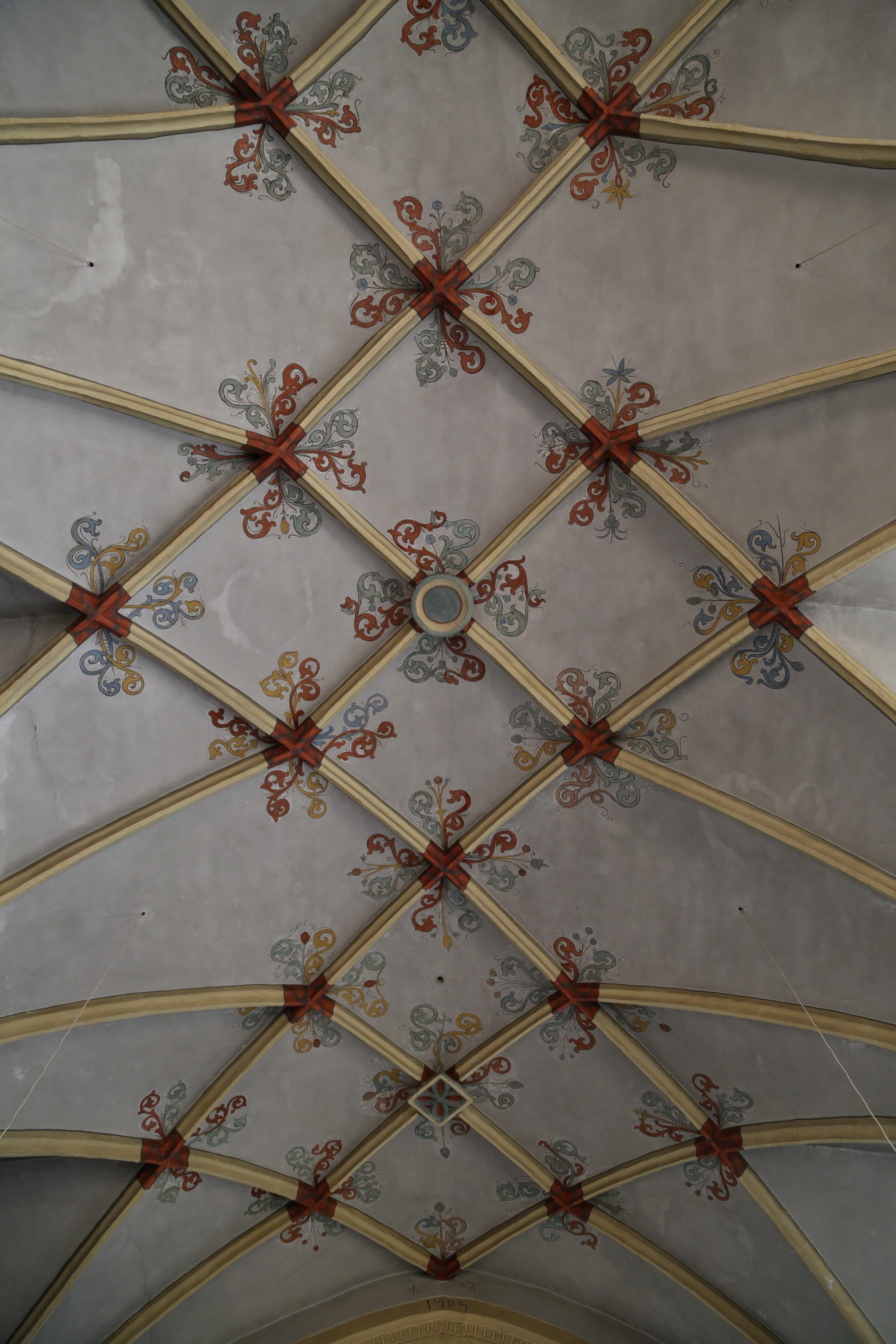 Katholische Pfarrkirche St. Agatha, Agatharied, Hausham; Spätgotischer Saalbau mit polygonalem Chor und Nordturm, 1505, um 1670 westlich erweitert und Chor barockisiert; mit Ausstattung